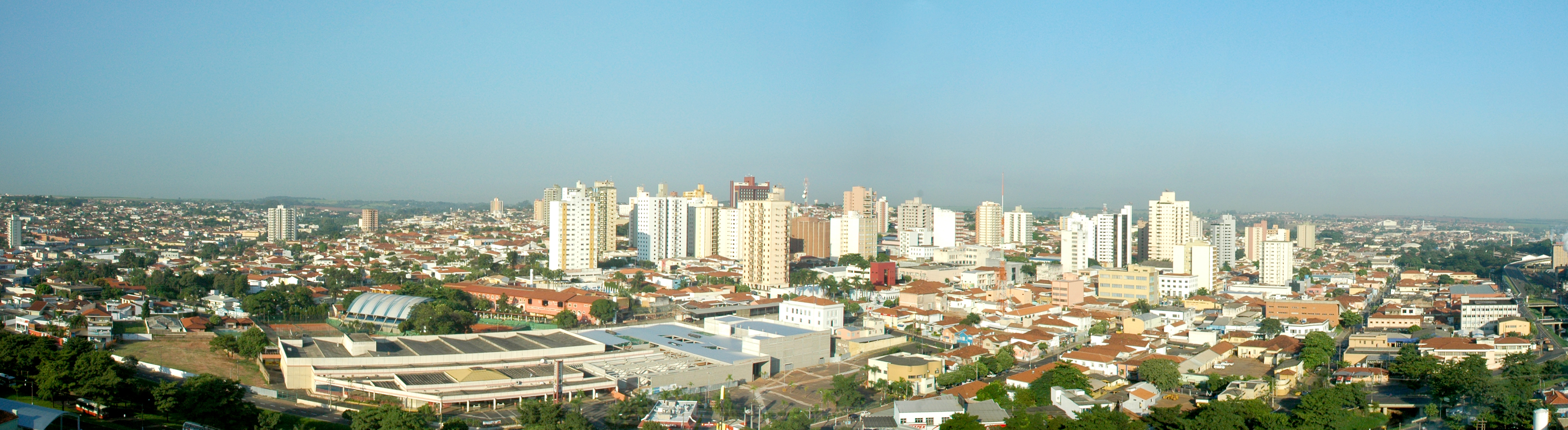 Visão Panorâmica de Catanduva